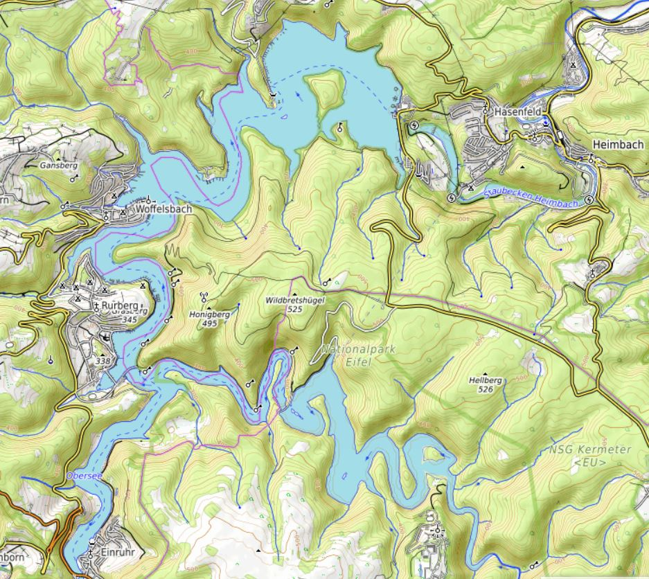 Rursee mit Haupt- und Obersee in der Eifel. Rechts der Urftsee